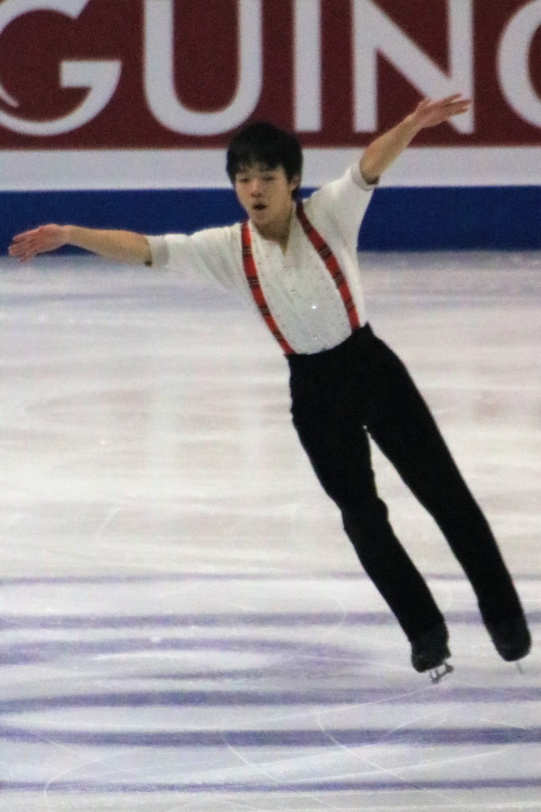 Юма Кагияма (Япония) на финале юниорского Гран-при 2019-2020